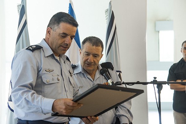 טקס הענקת דרגת תא"ל לטייס העבר ואלוף העולם בהפלות סילוניות, גיורא אבן-אפשטיין. בתמונה: מפקד חיל האוויר, האלוף עמיקם נורקין מעניק לתת אלוף אפשטיין את התעודה מטעם צה"ל וחיל האוויר.